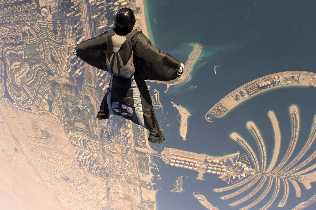 Dubai Wingsuit Flying Trip